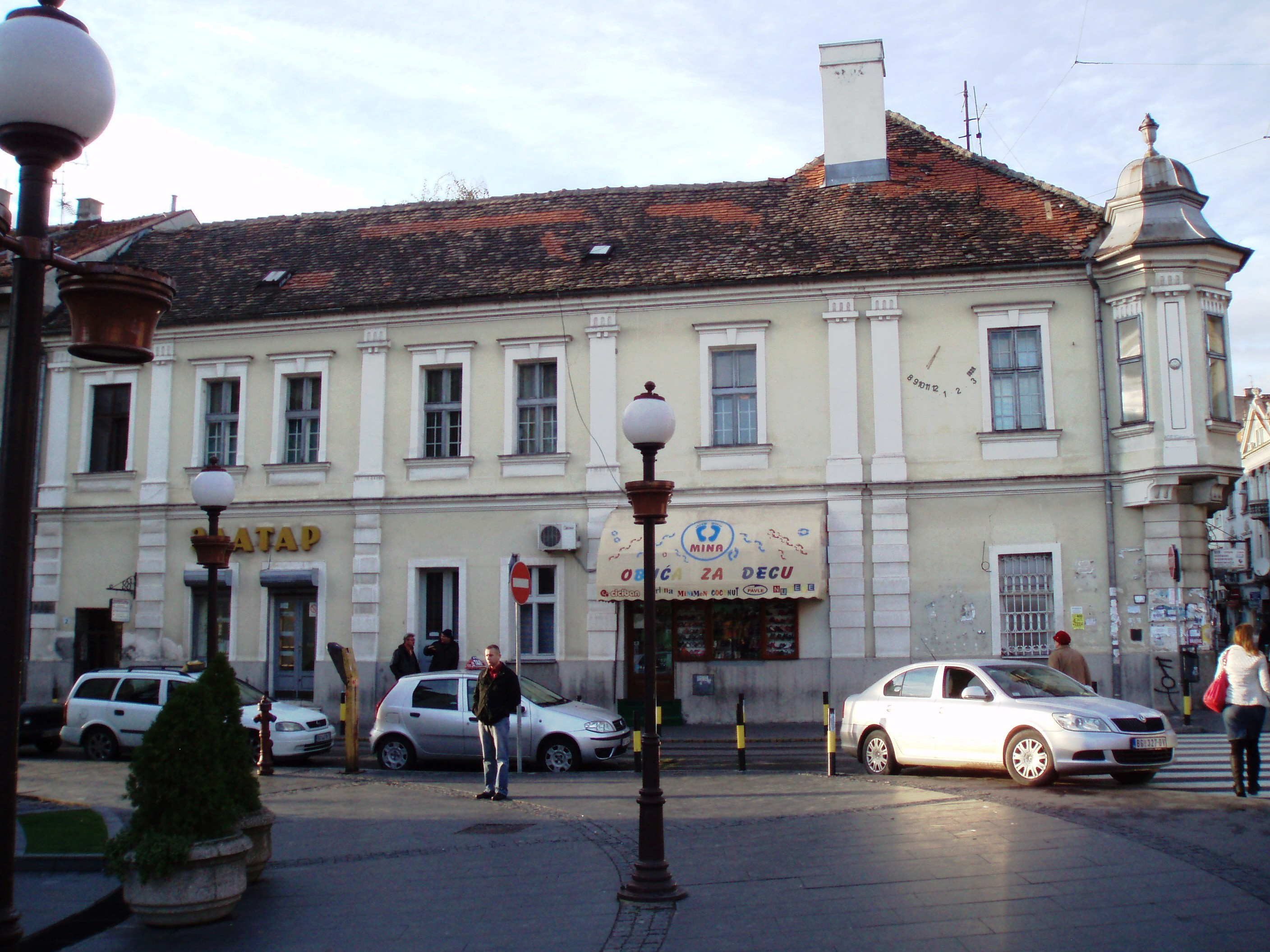 Kuća sa sunčanim satom, fasada iz Dubrovačke ulice, autor fotografije: Nicolo